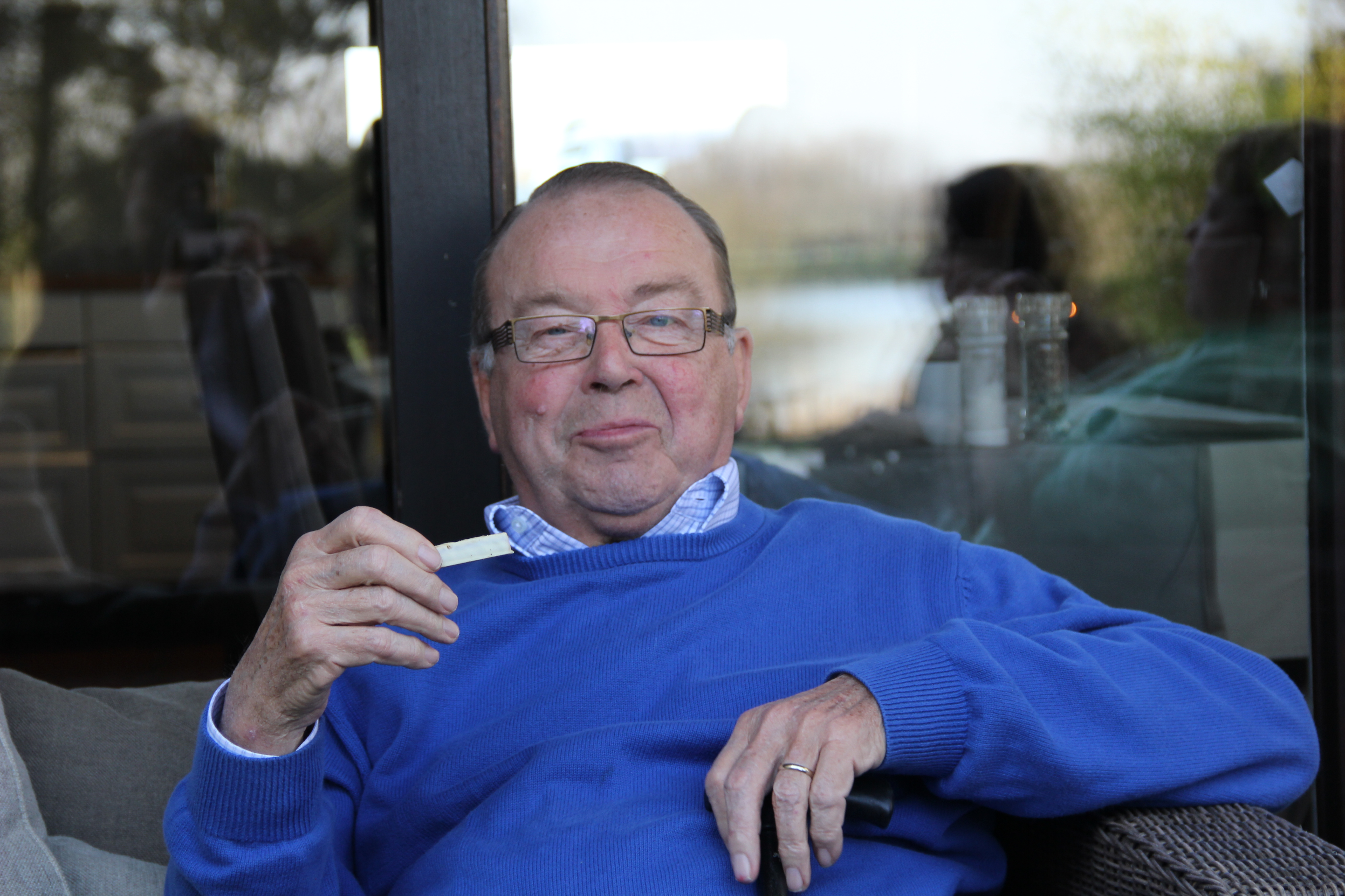 Marc zoals hij was, sociaal gedreven, met een hart voor de kleine man.